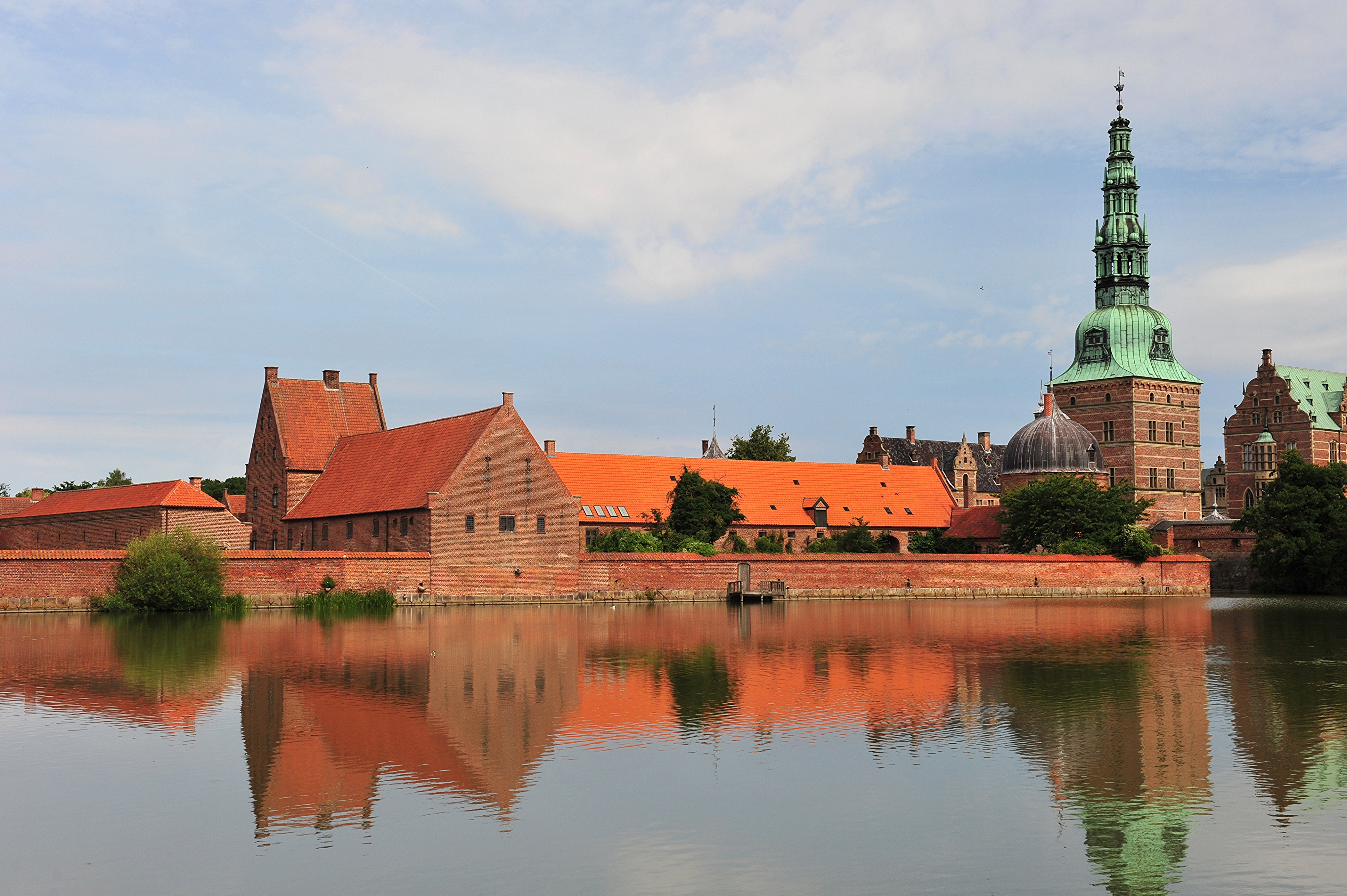 Frederiksborg slot, Hillerød (Denmark), 2013 August 445